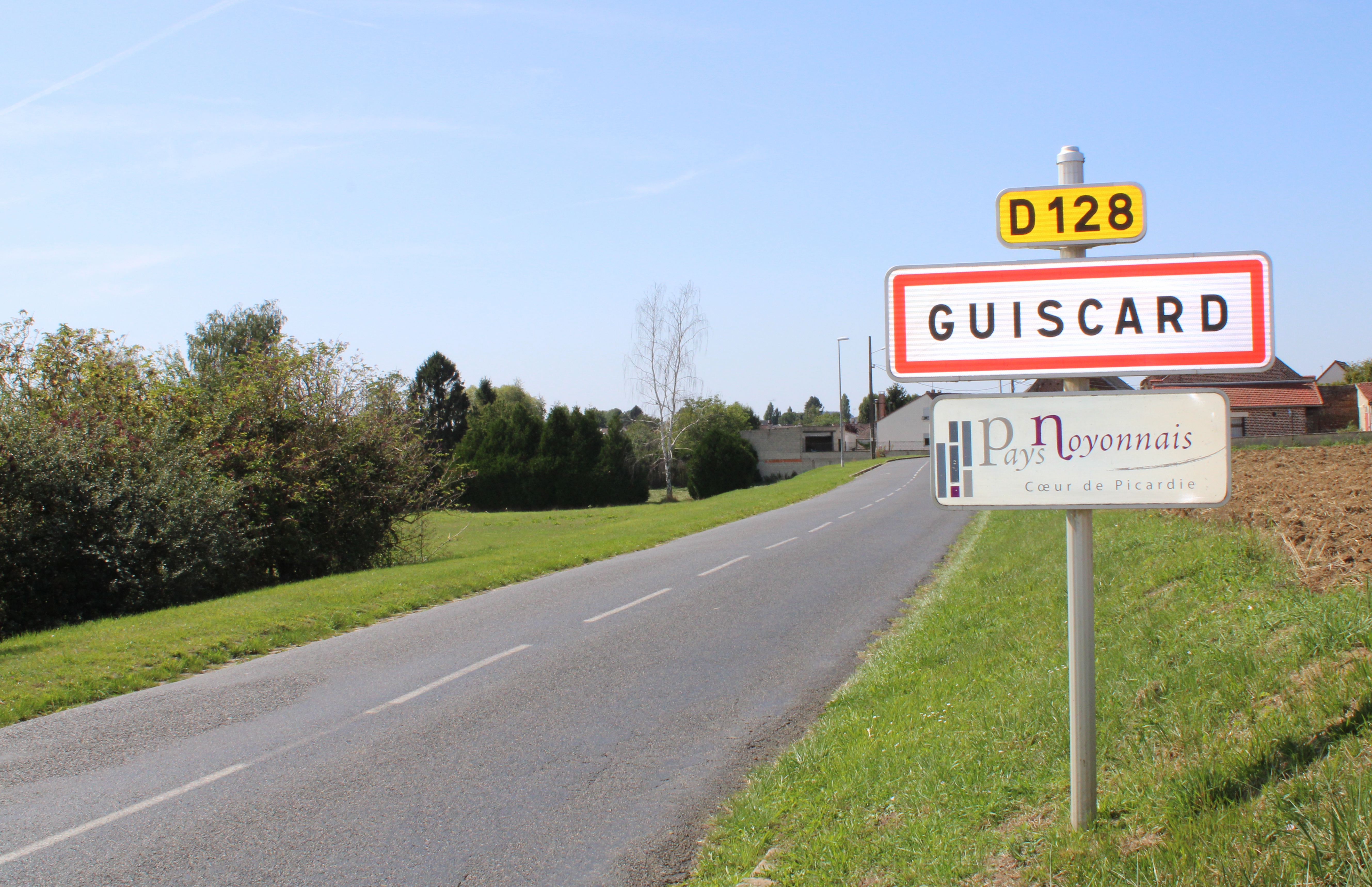 Entrée du village.